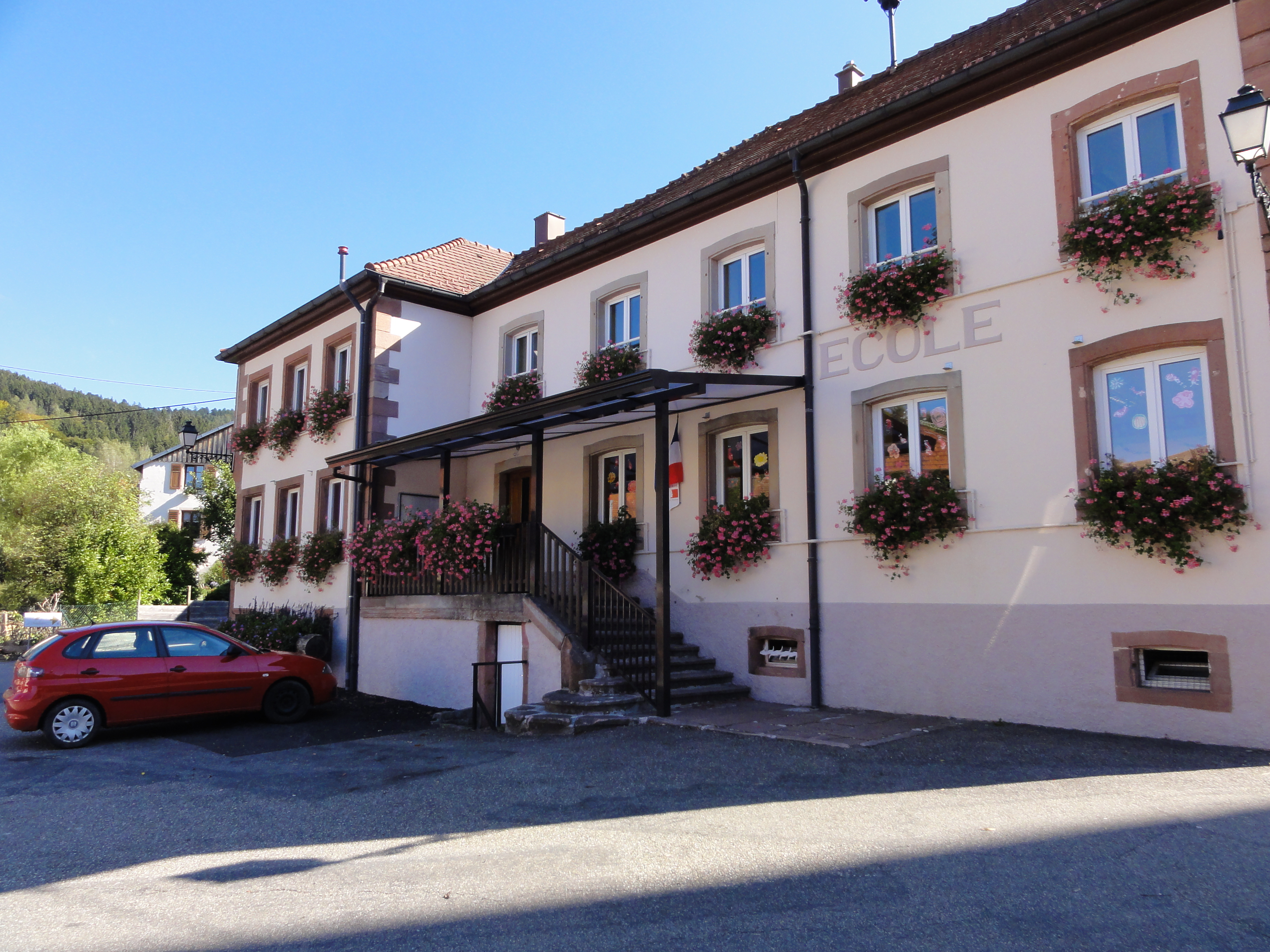 Alsace, Bas-Rhin, Colroy-la-Roche, Ecole, ancienne mairie (XVIIIe-XIXe), 2 rue de l'Eglise. .